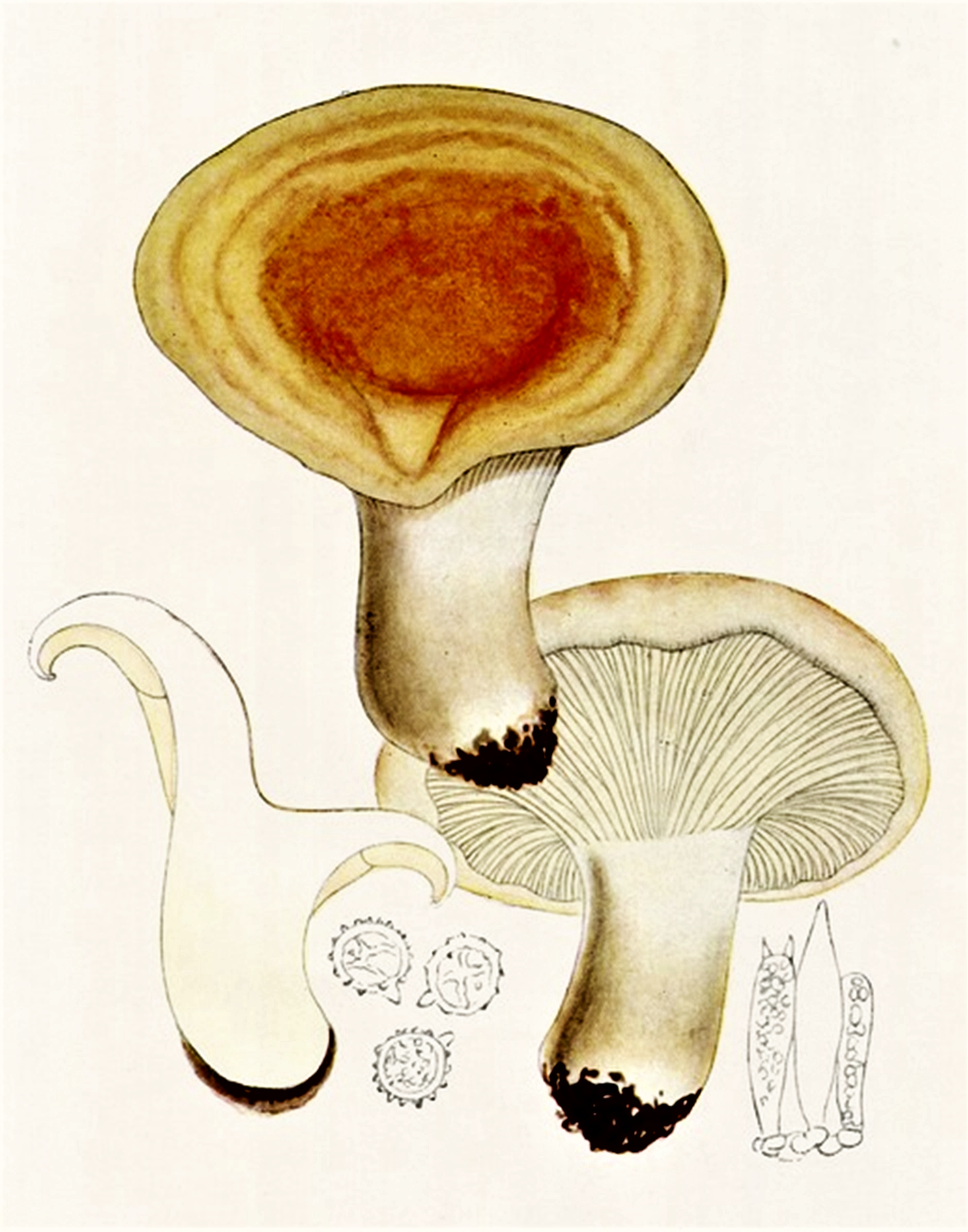 Giacomo Bresadola: Lactarius zonarius (Bull., 1783) Fr. (1838)